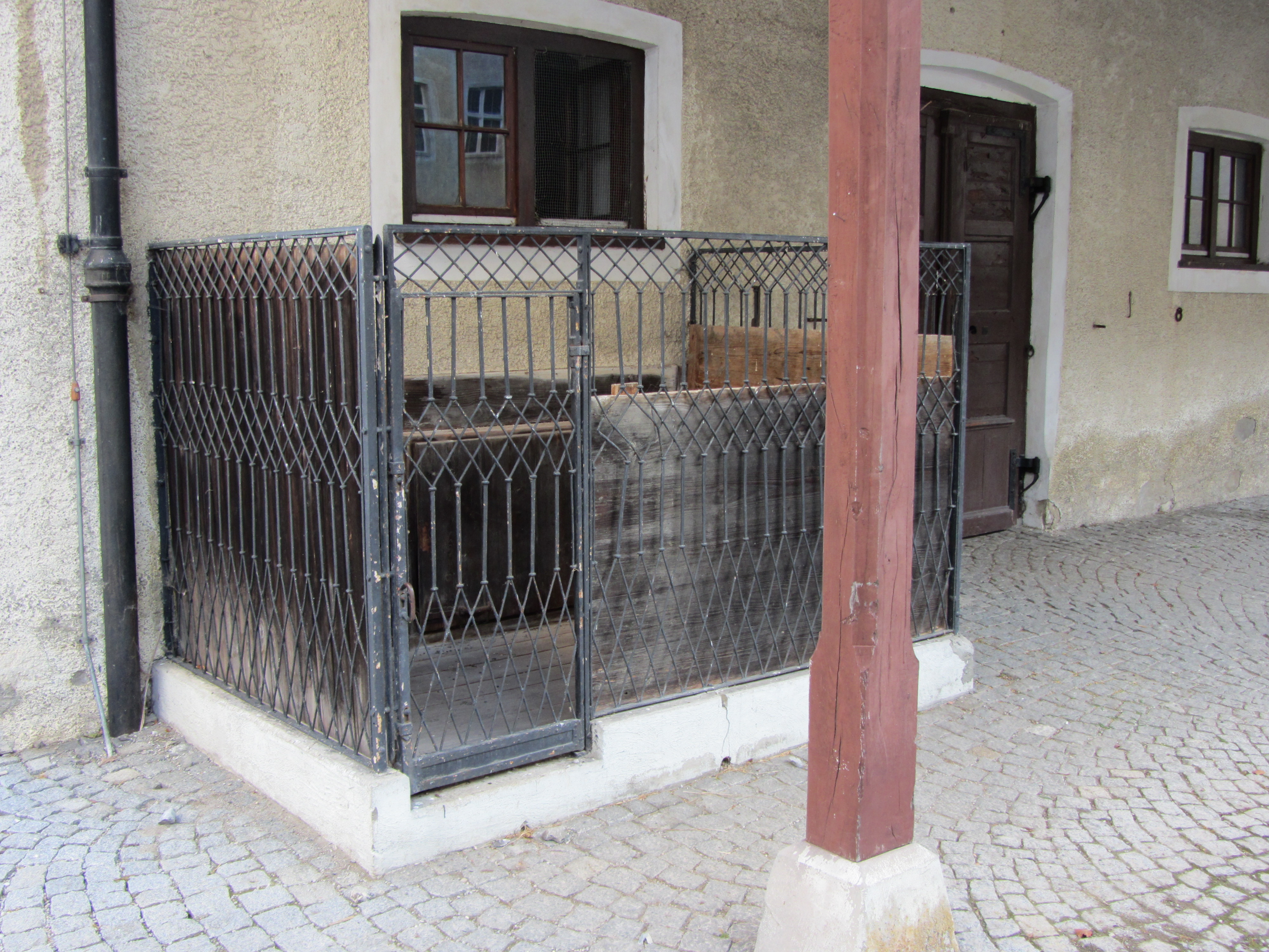 Weihnachtsmarkt - Altes Schloss - Hundezwinger